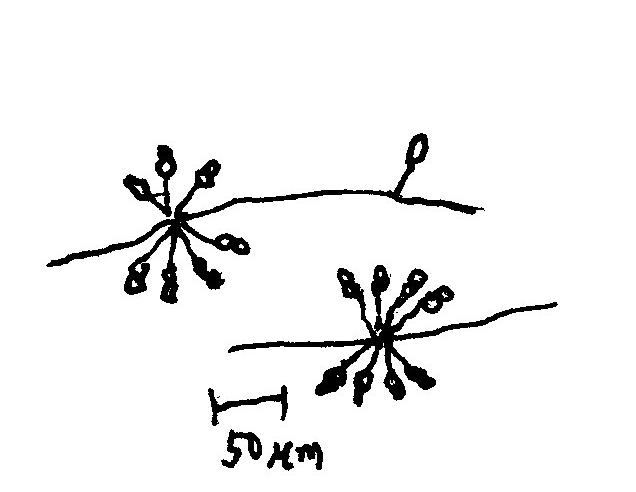 Shipton et Schipper(1975)より模写